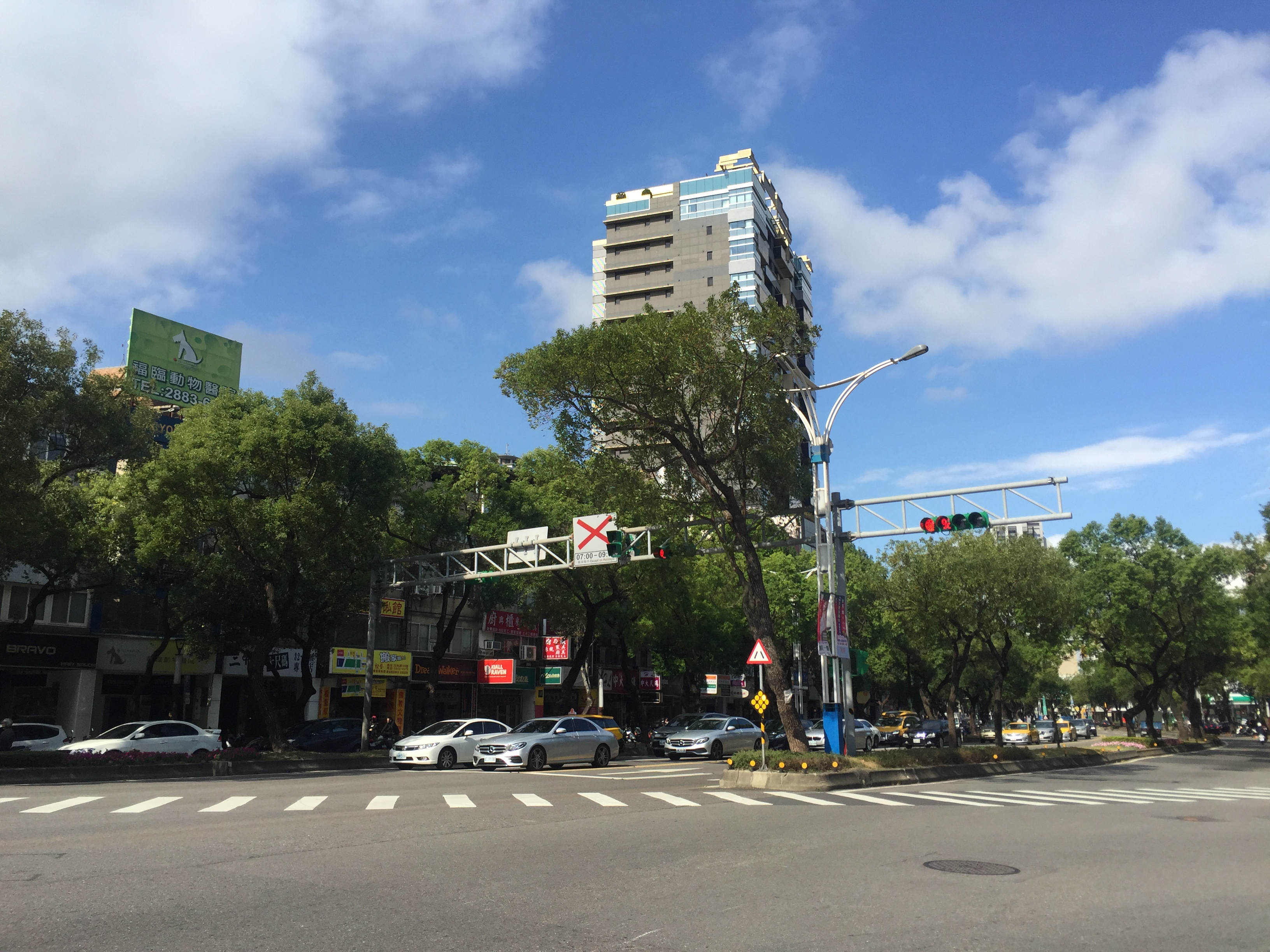 臺灣臺北市士林區中山北路與福林路口